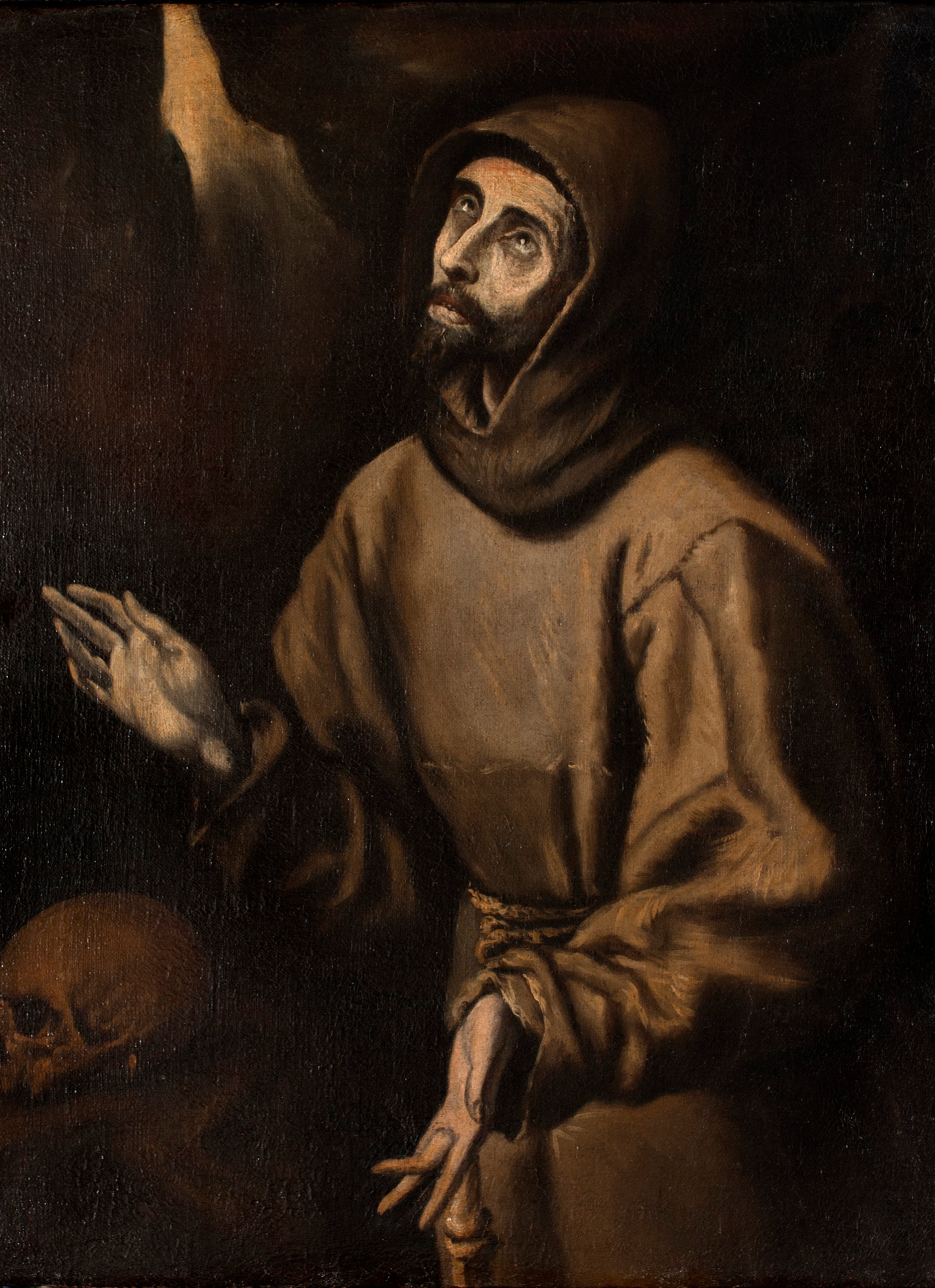 La obra muestra a San Francisco de Asís, fundador de la Orden de los franciscanos, en actitud extasiada y contemplativa.